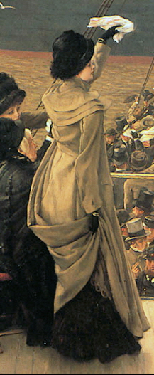 Détail de Image:Tissot Traveling Coat2.jpg qui est elle-même un détail d'une toile de 1881 de Tissot, "Goodbye - On the Mersey